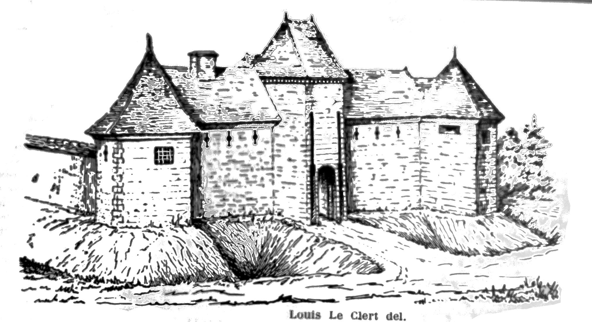 image de cf. titre.